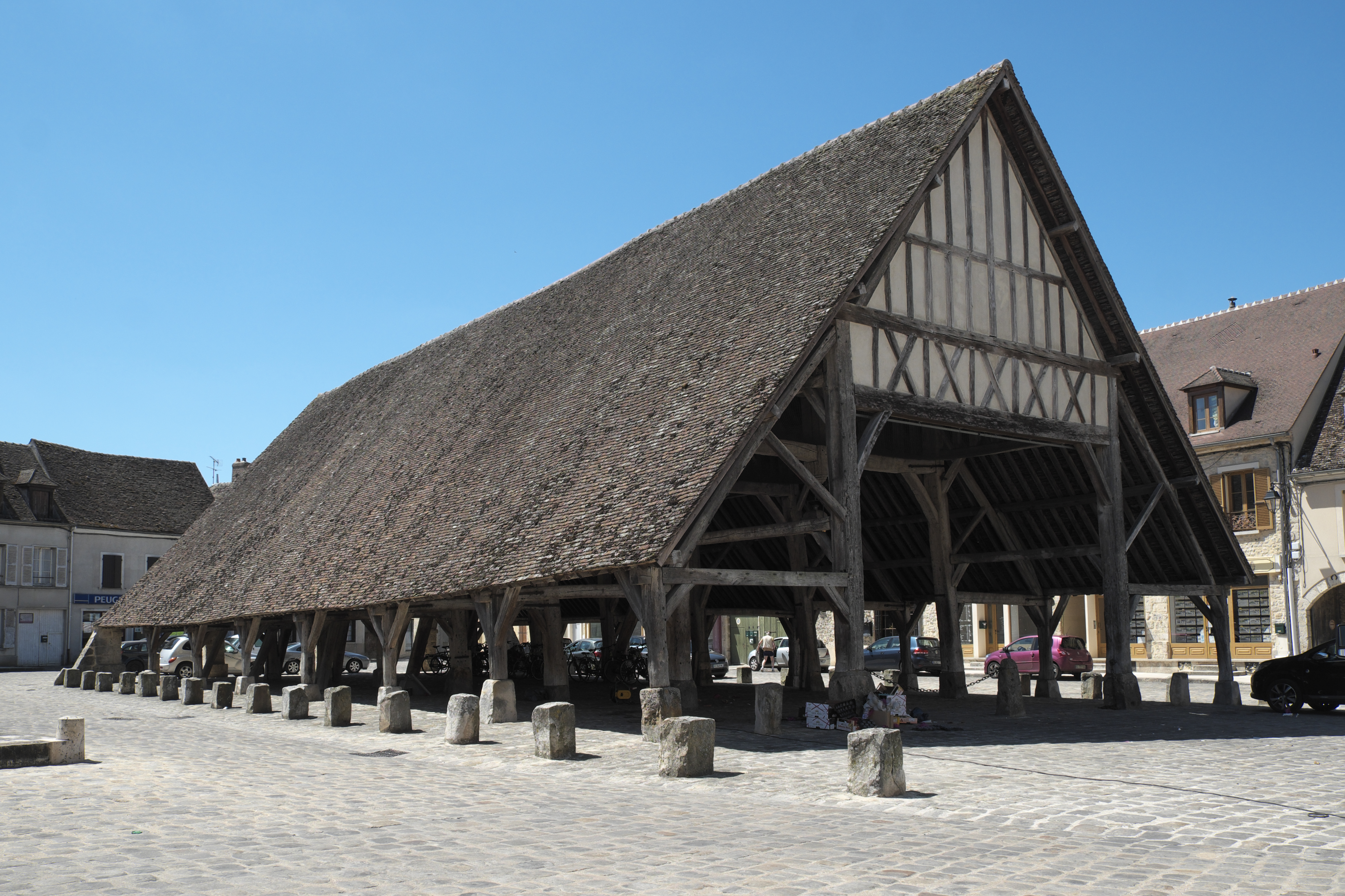 Markthalle in Égreville im Département Seine-et-Marne (Region Île-de-France/Frankreich)